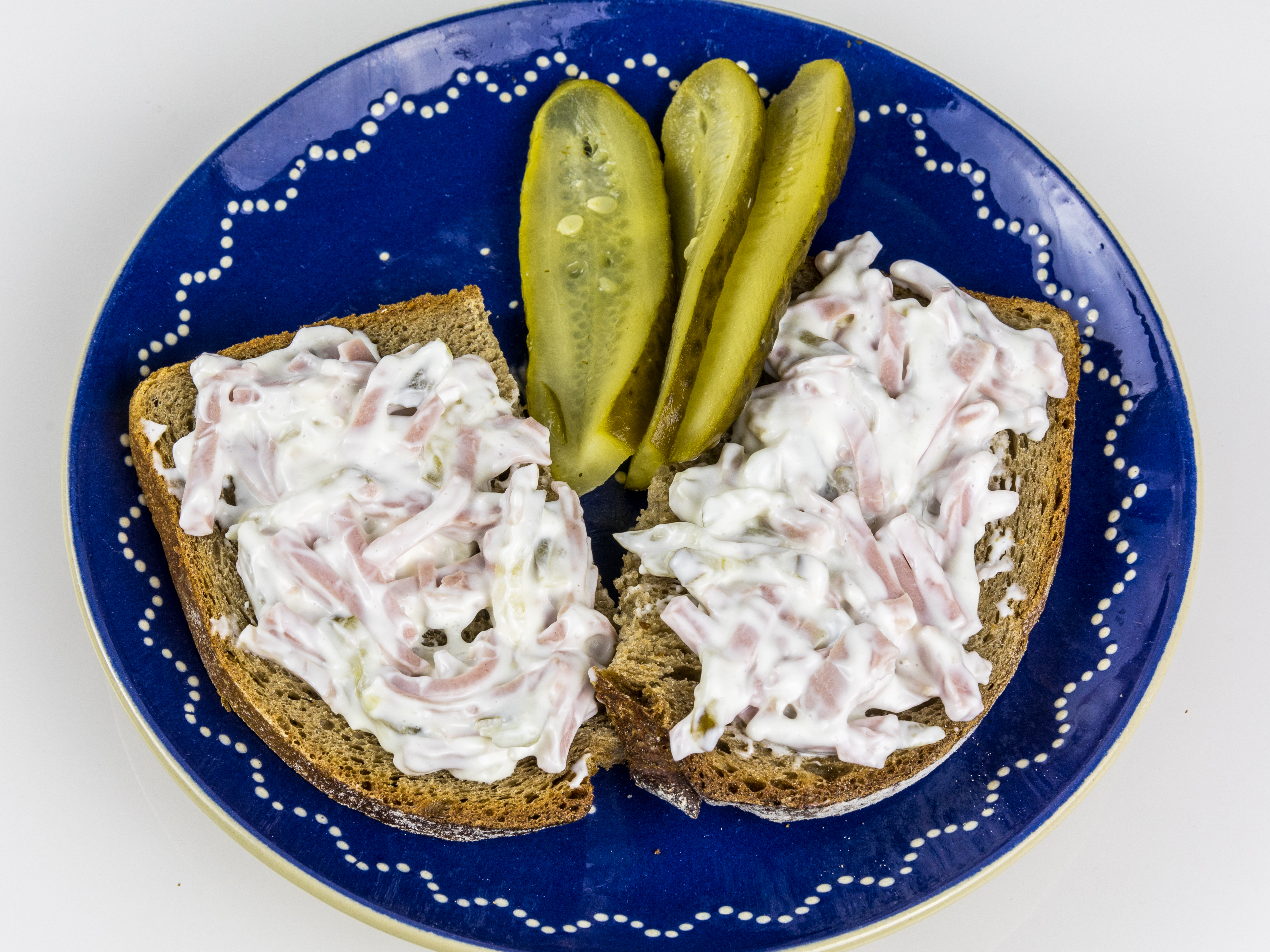 Fleischsalat von REWE auf Graubrot mit saurer Gurke